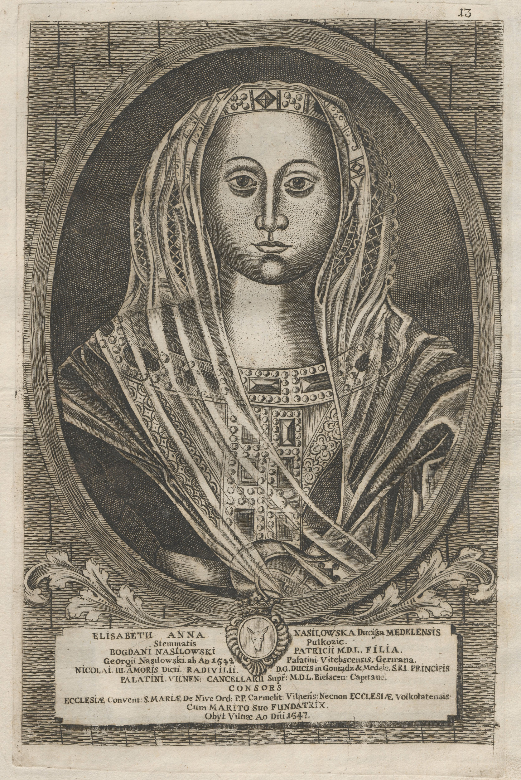 Беларуская (тарашкевіца): Партрэт Альжбеты Радзівіл (Alžbieta Radzivił) з роду Саковічаў (Sakovič)